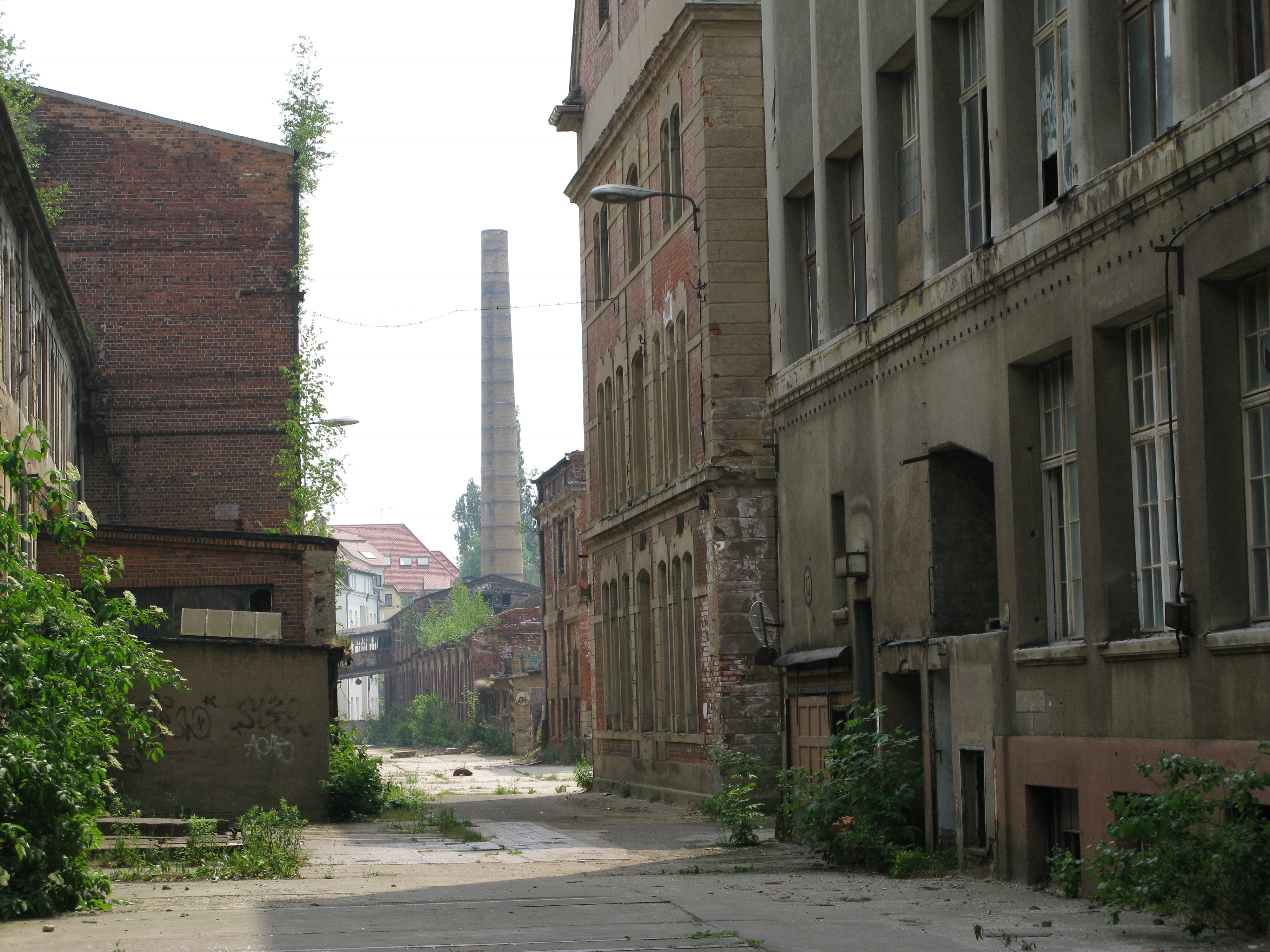 Teilansicht ehemalige Fabrik Bleichert & Co. Leipzig-Gohlis, Sachsen, Deutschland